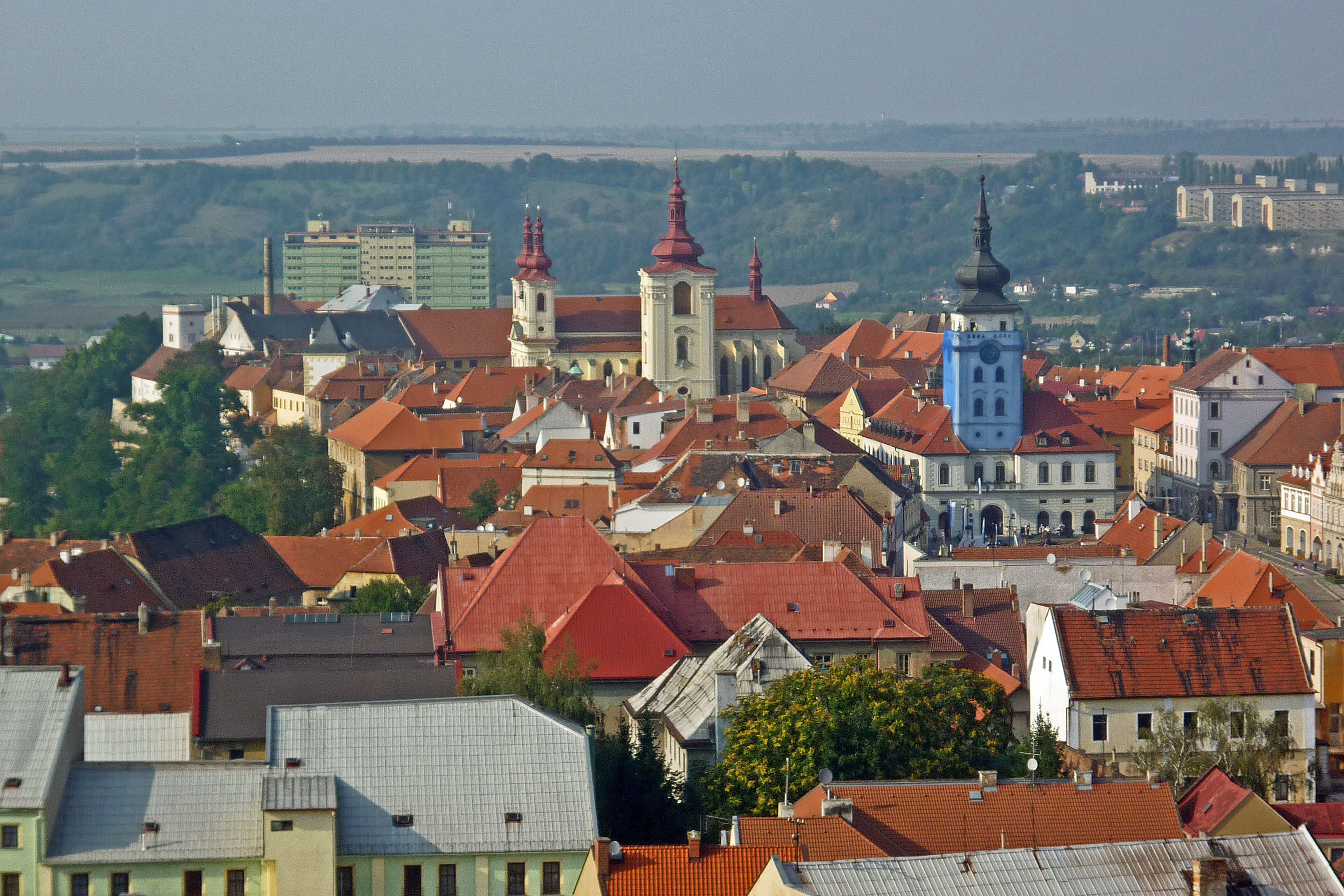 Saaz/Žatec, Blick vom Hopfenturm auf die Altstadt